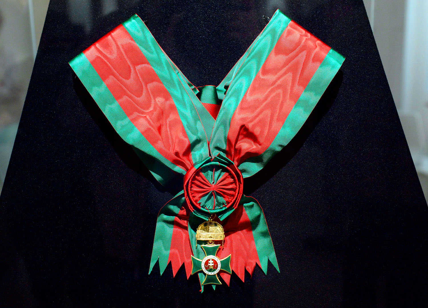 Magyar Szent István-rend Nagykeresztje